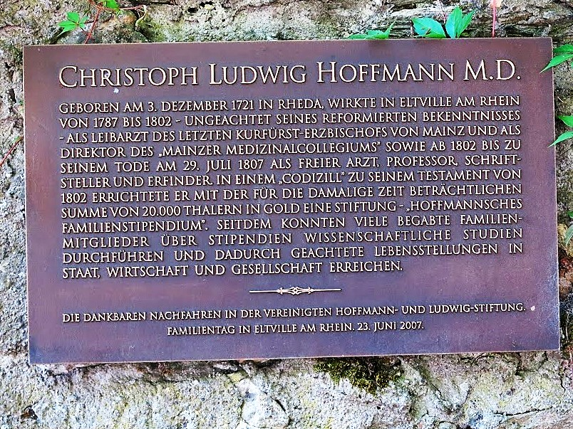 Eltville, Gedenktafel zu dem Christoph Ludwig Hoffmann (* 3. Dezember 1721 in Rheda; † 28. Juli 1807 in Eltville) war ein deutscher Arzt, Physicus, Leibarzt und Gesundheitswesenreformer.